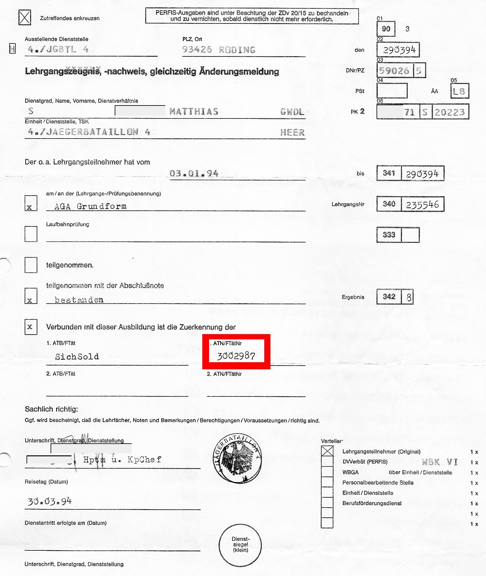 Bundeswehr - 4. Kompanie/Jägerbataillon 4 (Roding): Lehrgangsnachweis ATN Sicherungssoldat, gleichzeitig Änderungsmeldung (linke Seite) mit nachträglich eingefügter Umrandung "ATN 3002987" zur grafischen Hervorhebung (nicht original)